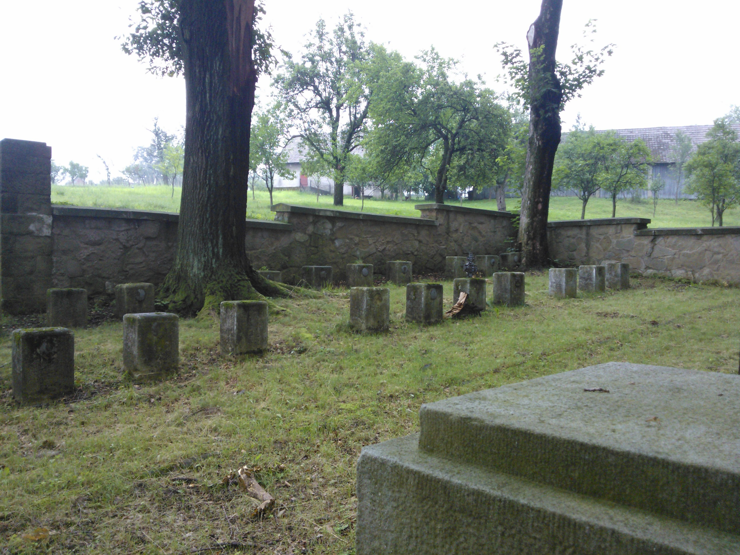 Cmentarz wojenny nr 194 - Szczepanowice-Żabno